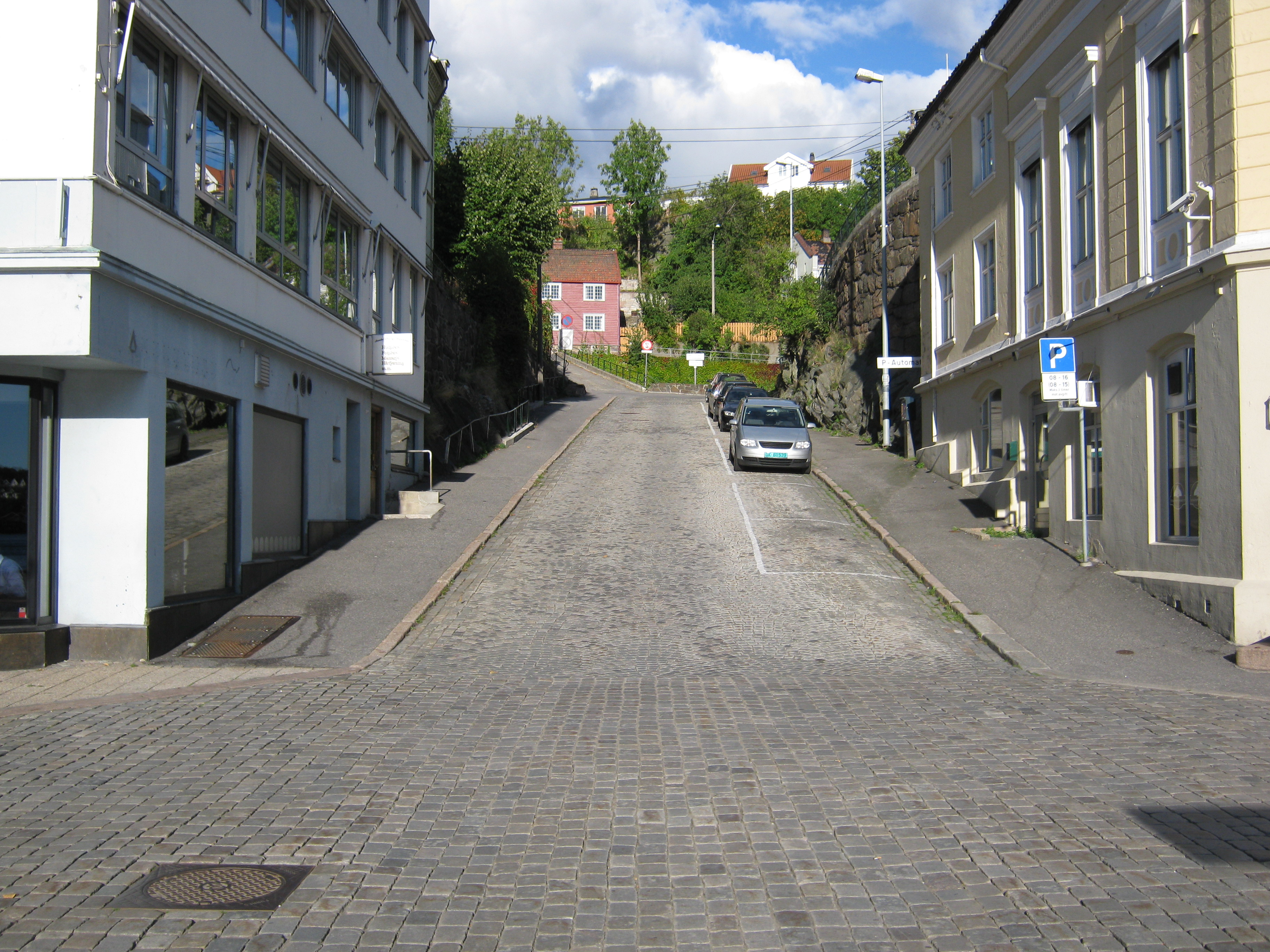 Nedre del av Nesbakken i Arendal sentrum, sett fra Langbryggen